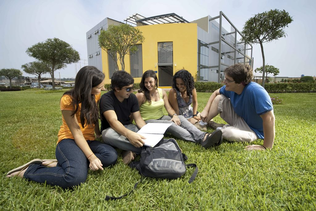 Campus Villa I de la Universidad Científica del Sur